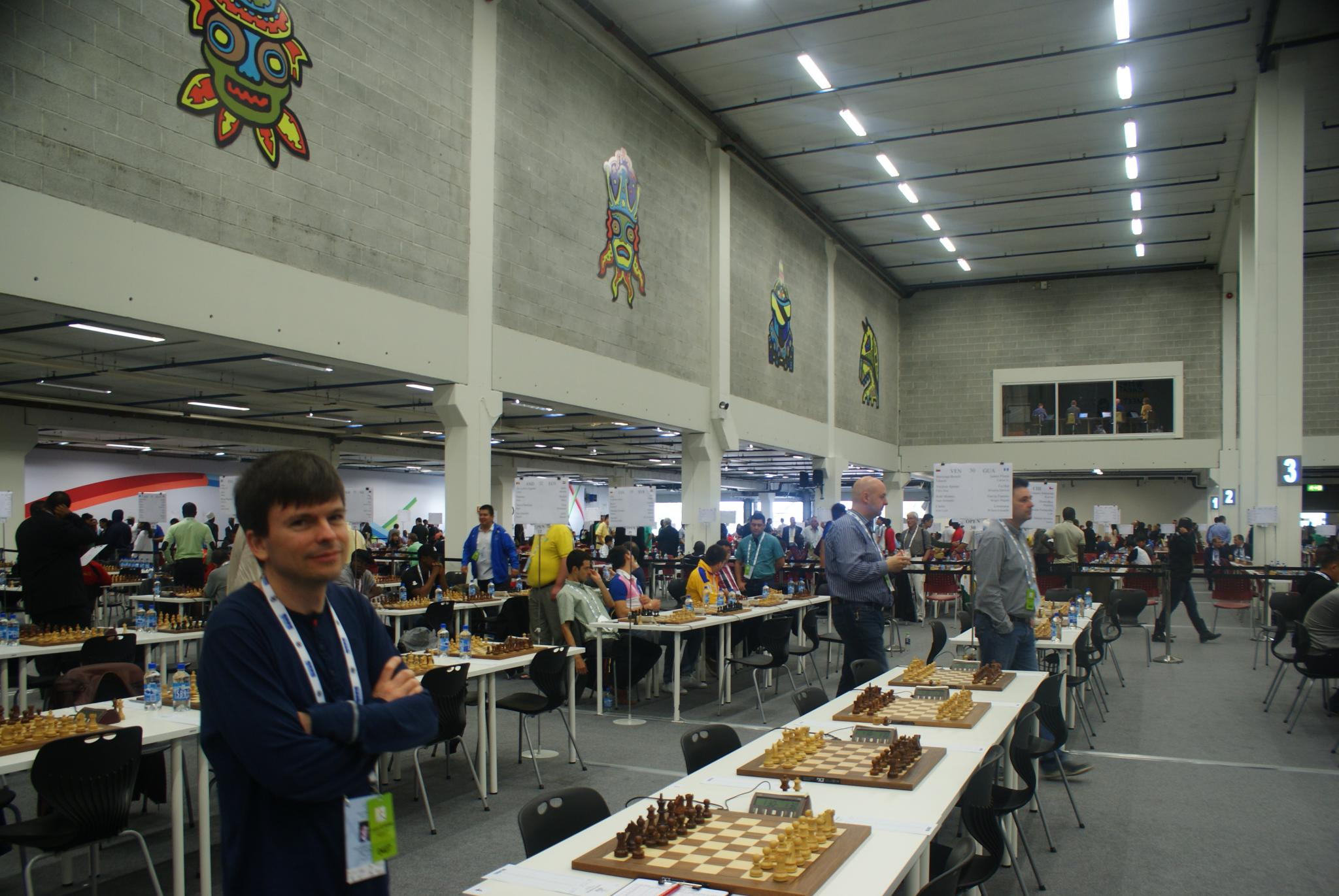 20140804_Ronda03_09